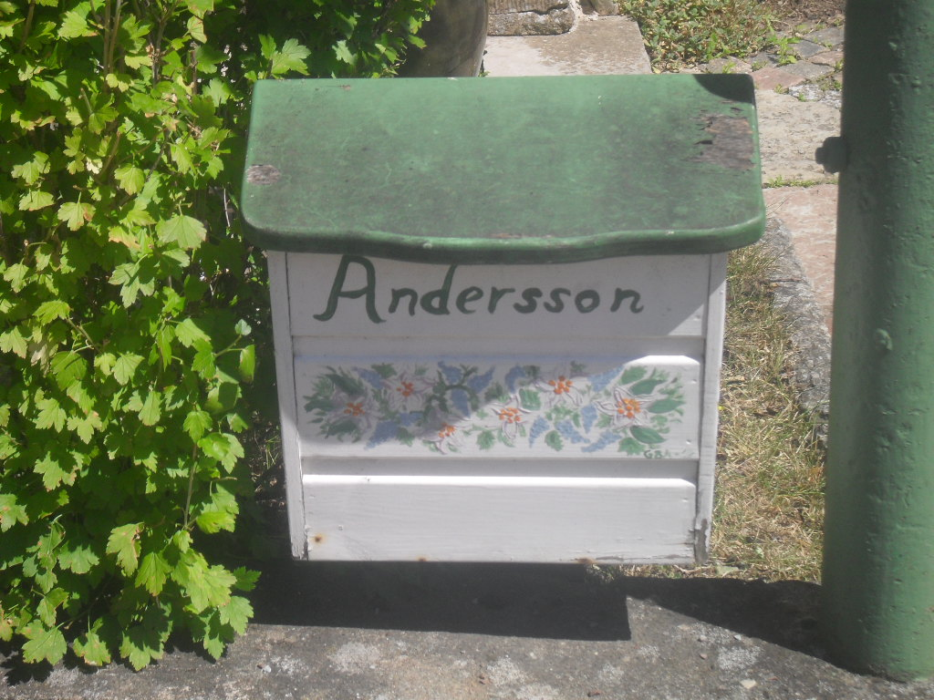 En brevlåda